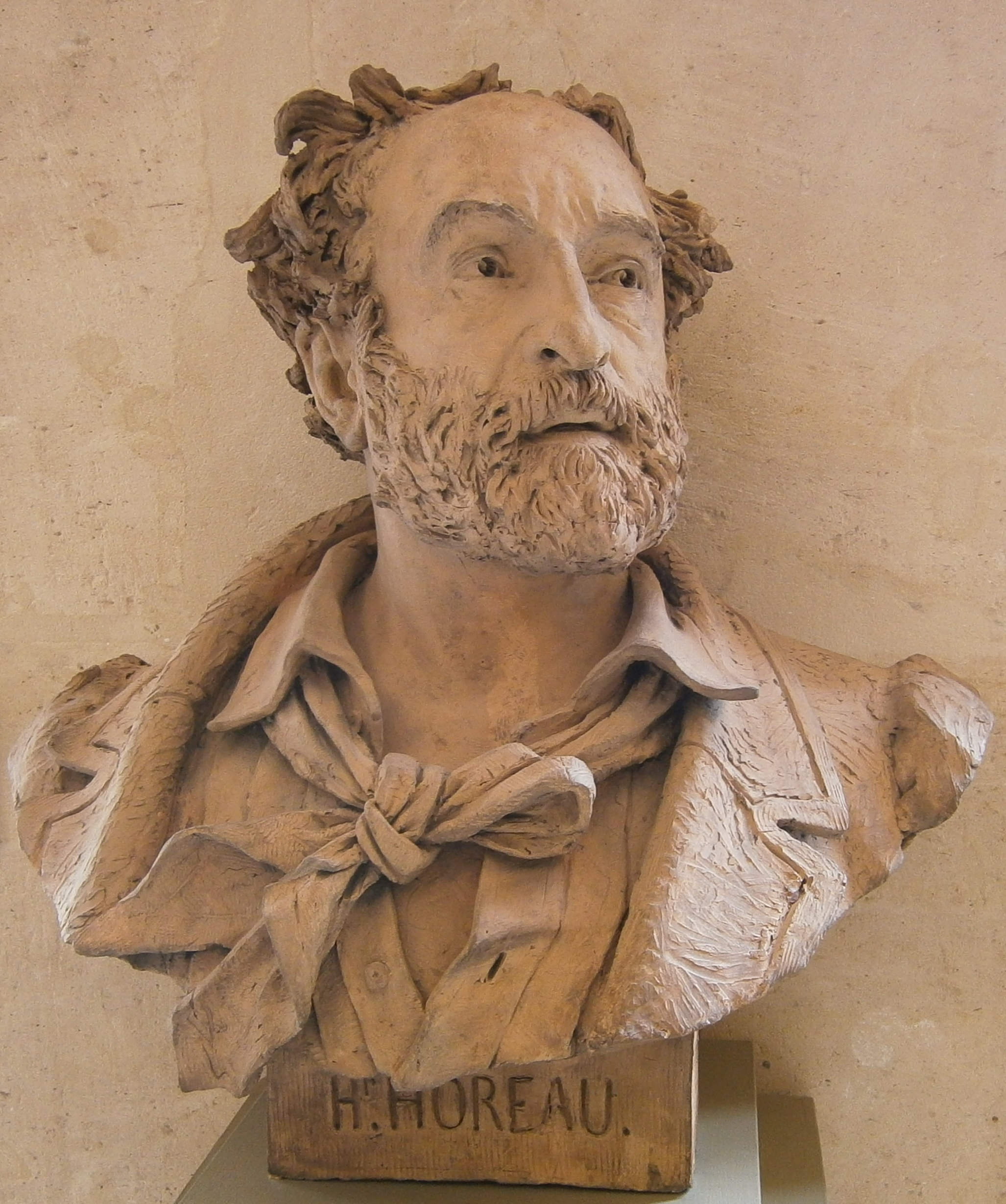 Buste de l'architecte Hector Horeau, par Adolphe Itasse. Signature et autres inscriptions sur le socle : "A. Itasse - à son ami - Hr. Horeau. - Paris 1864".